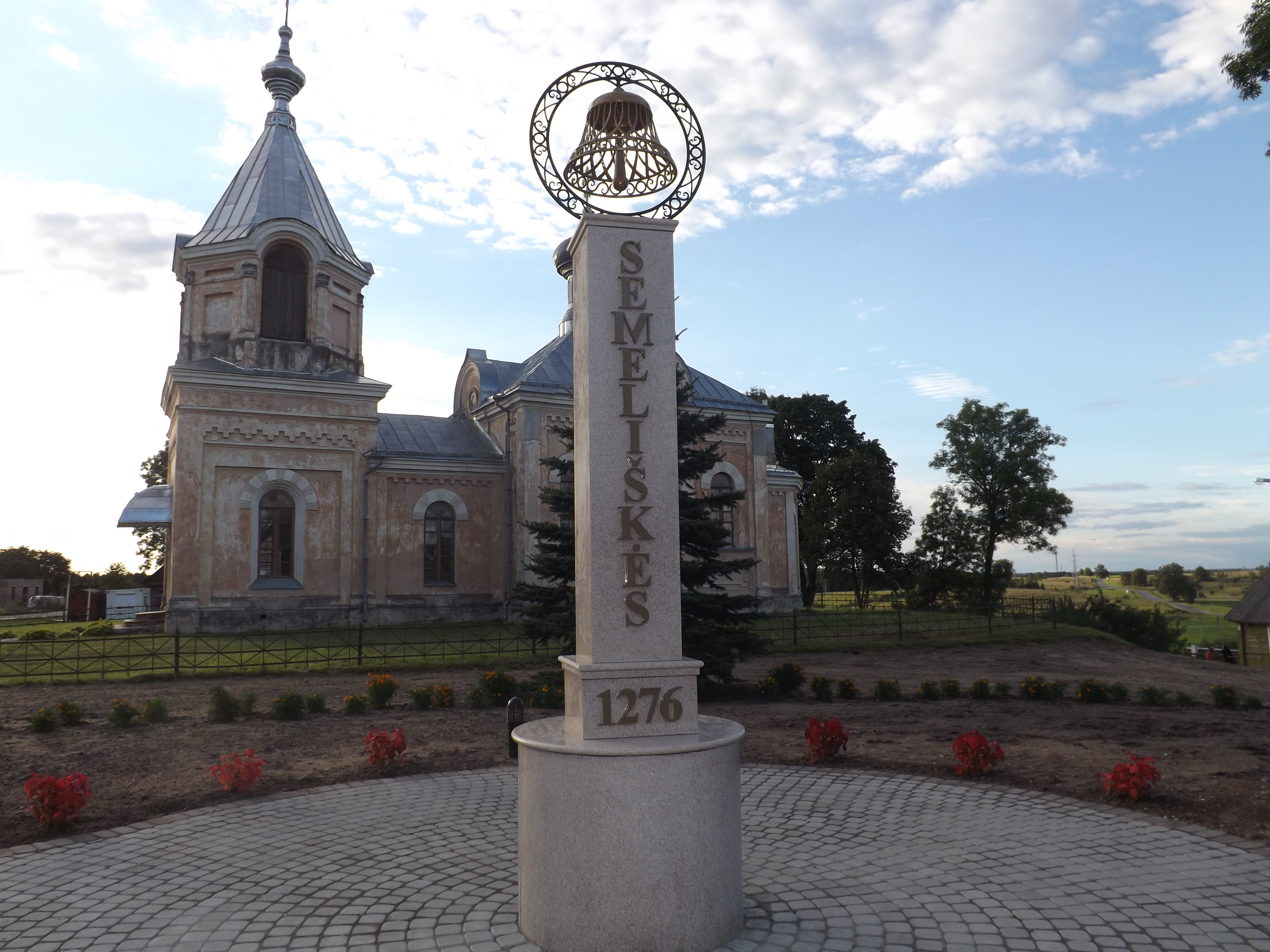 Monumentas "Semeliškės" skirtas Semeliškių miestelio 740 metų jubiliejui, 2016 m.